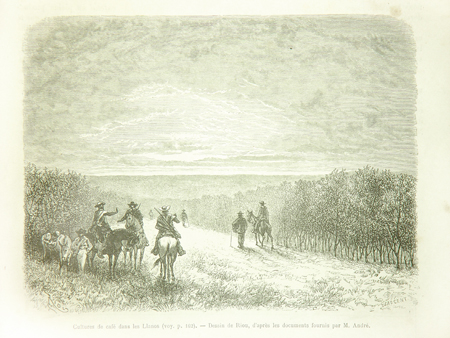 "Cultures de café dans les Llanos" Croquis paru dans : André, Édouard L'Amérique Équinoxiale (Colombie-Equateur-Perou) Paris, Librería Hachette, 1869, p. 161